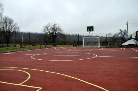 с. Завій